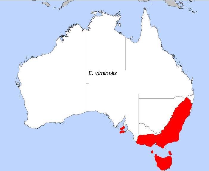 Carte d'Eucalyptus viminalis